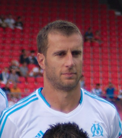 Benoît Cheyrou en 2013